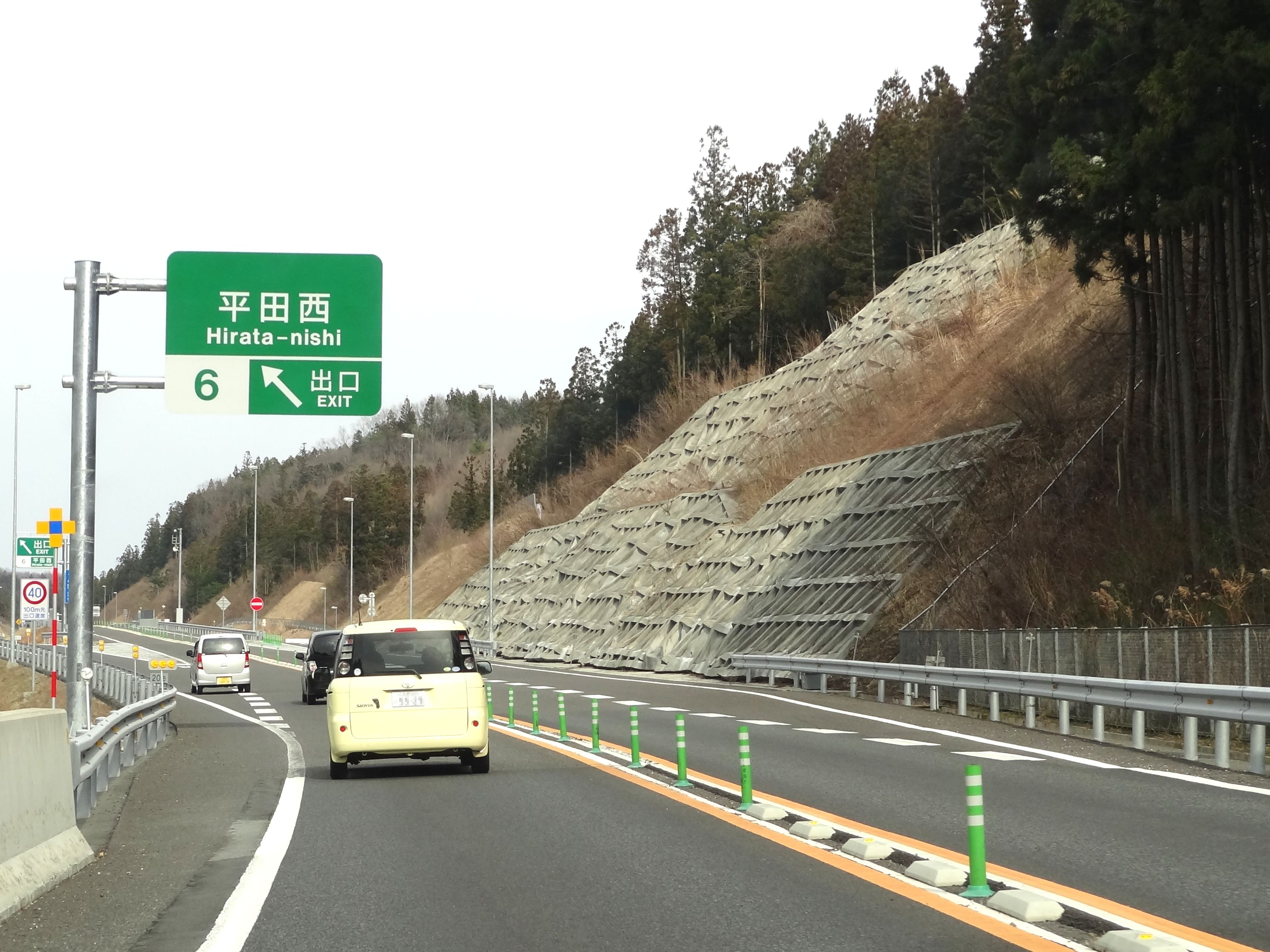 あぶくま高原道路 平田西インターチェンジ（下り線出口付近）